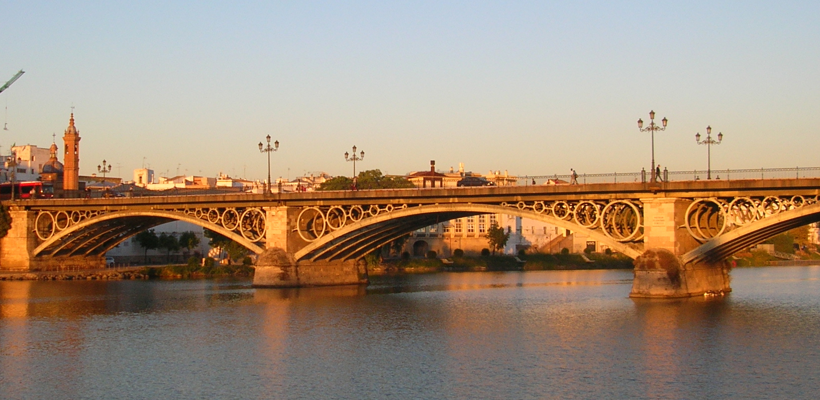 Le Pont de Triana, Séville.